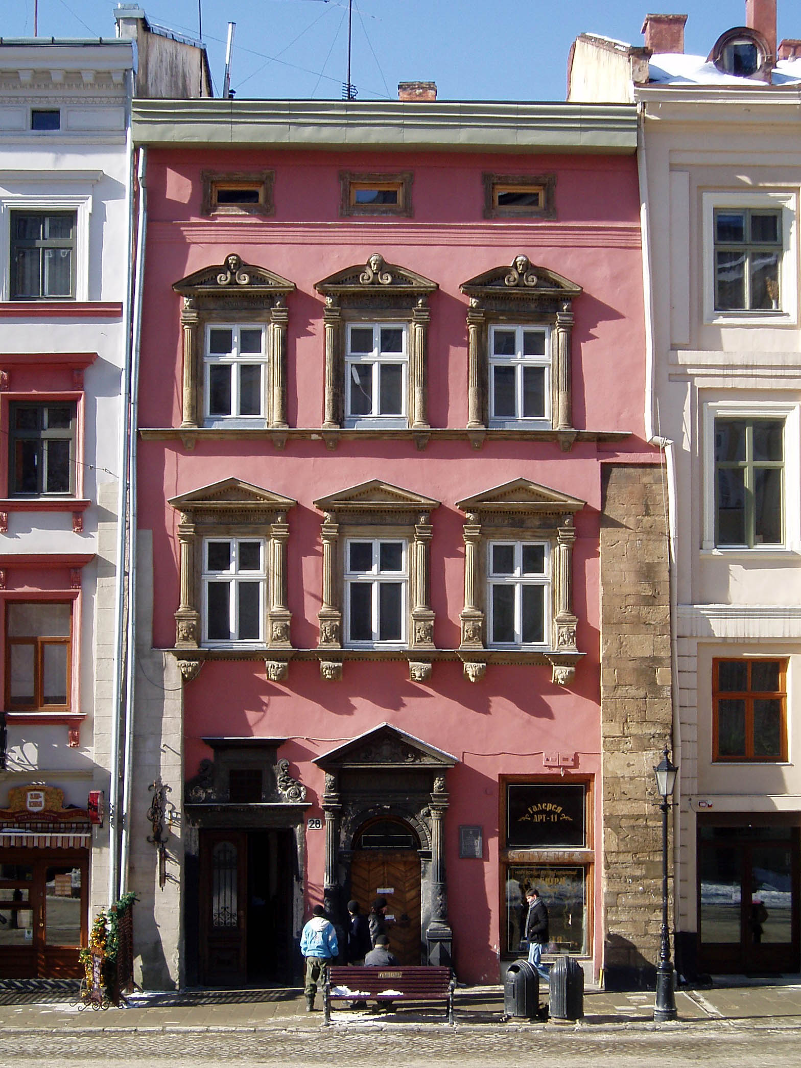 Будинок № 28 на Площі Ринок у Львові